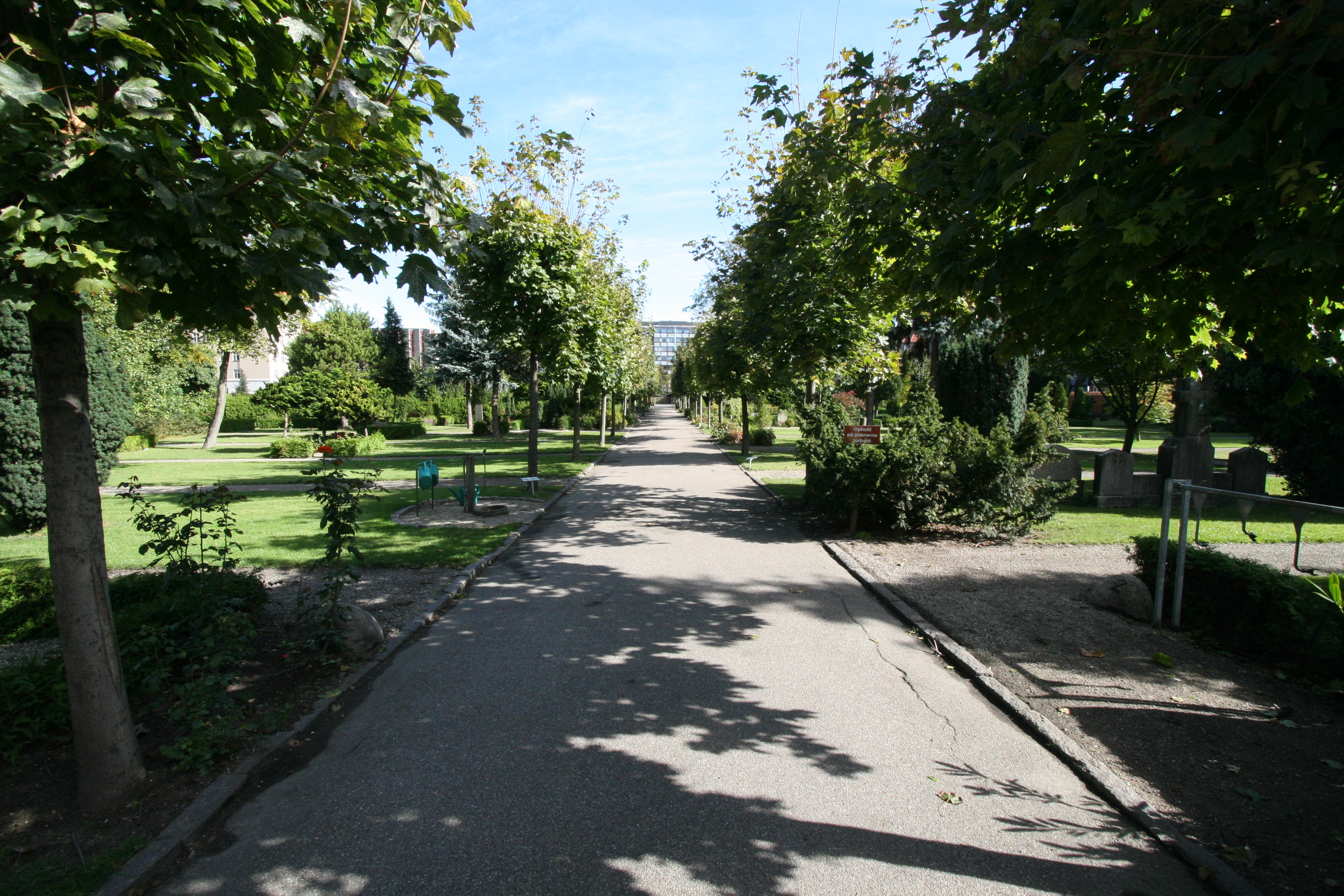 Vor Frelser Kirke (Church of Our Saviour), Copenhagen, Denmark. Vor Frelser Kirkes graveyard on Amager.